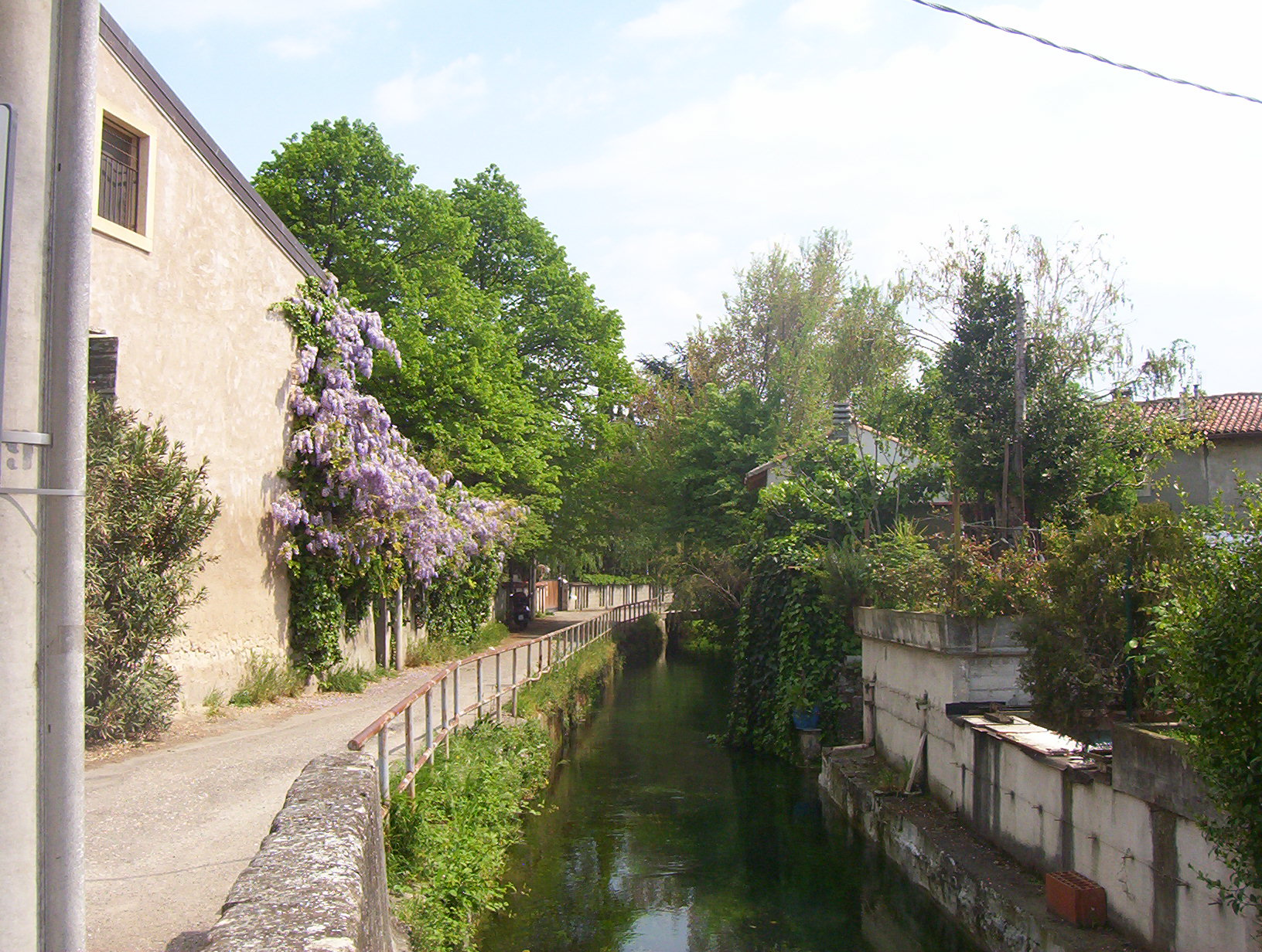 Montorio (frazione di Verona)